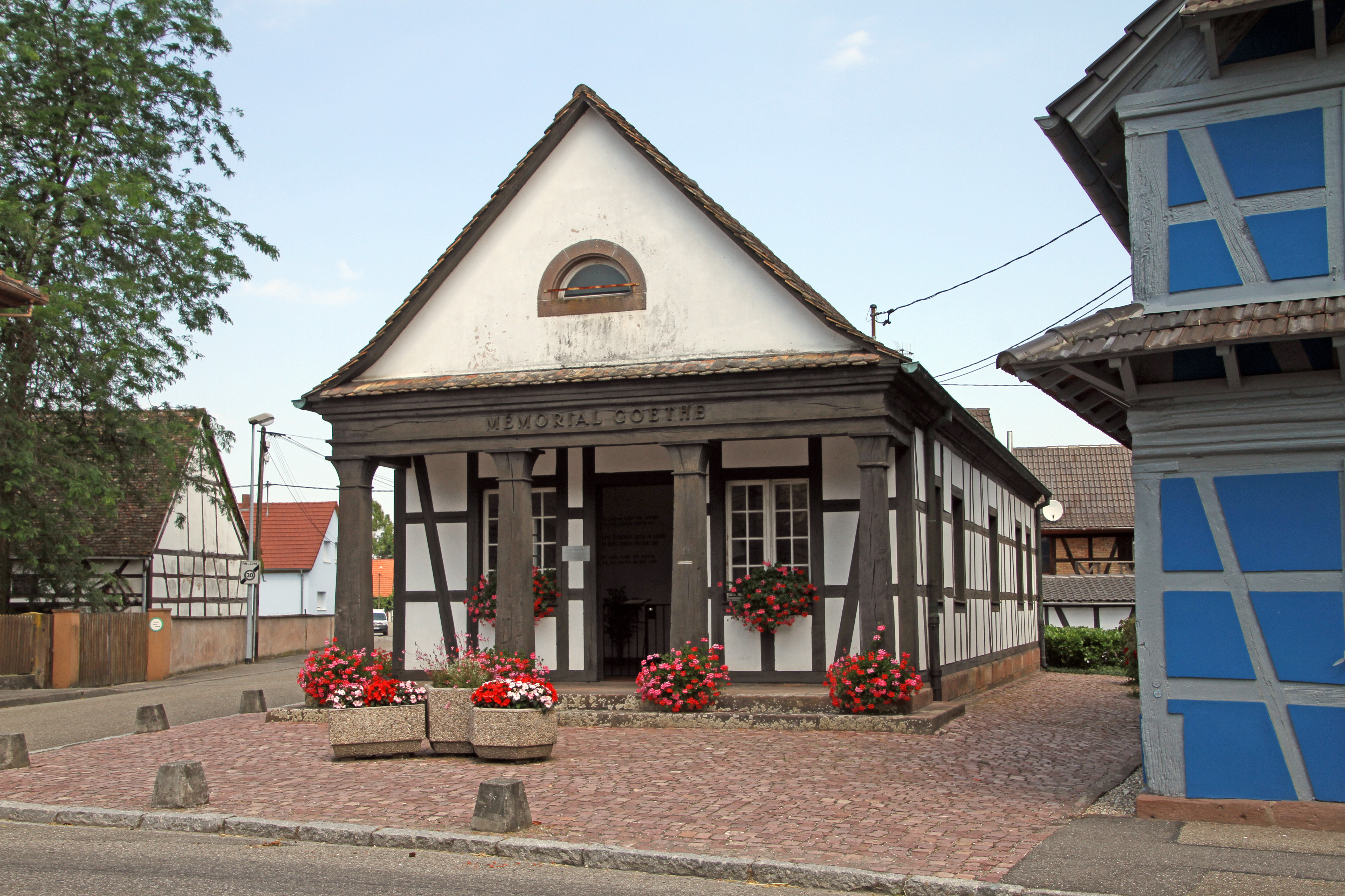 Sessenheim, Goethe-Memorial